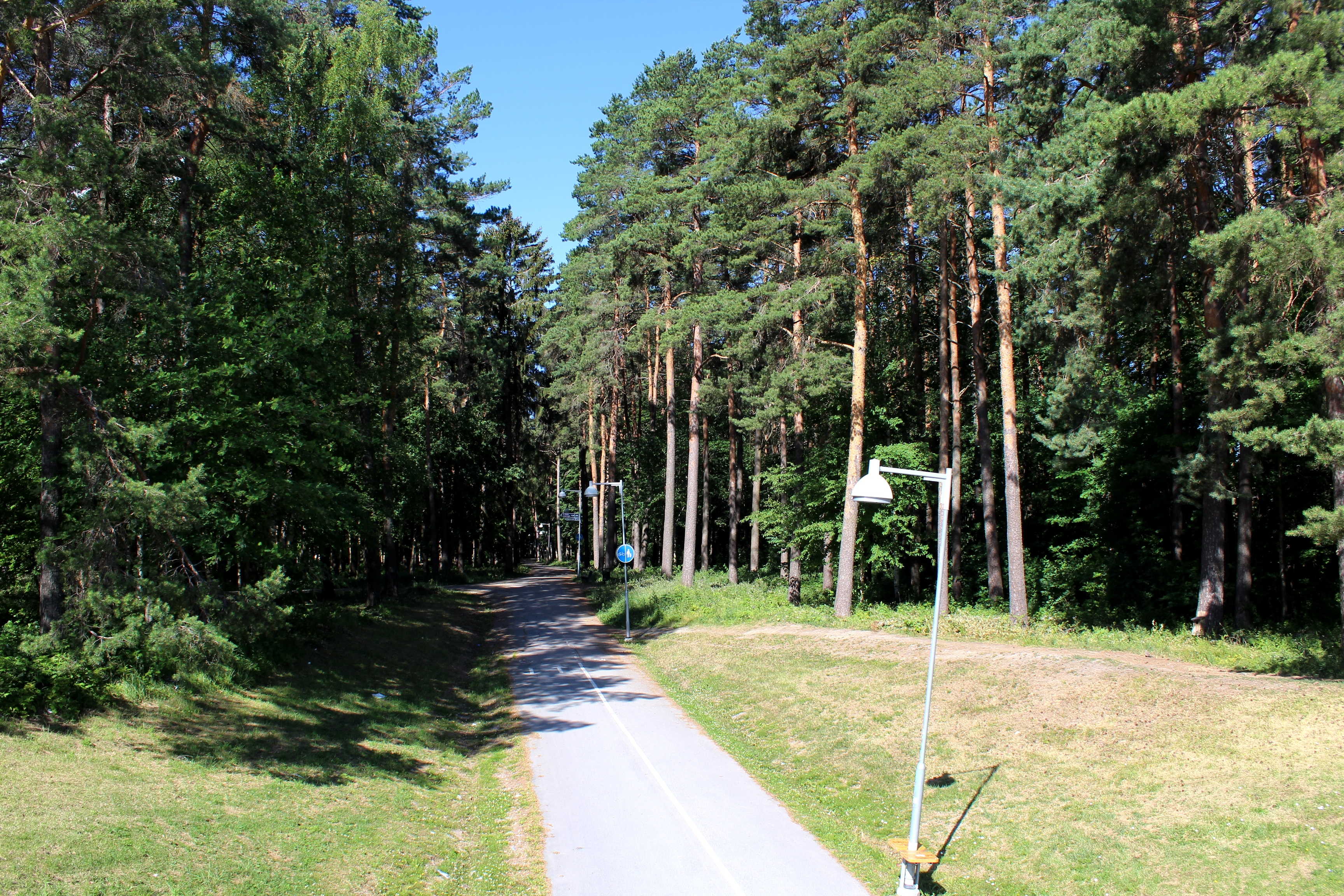 von Bahrska häcken, park i Uppsala